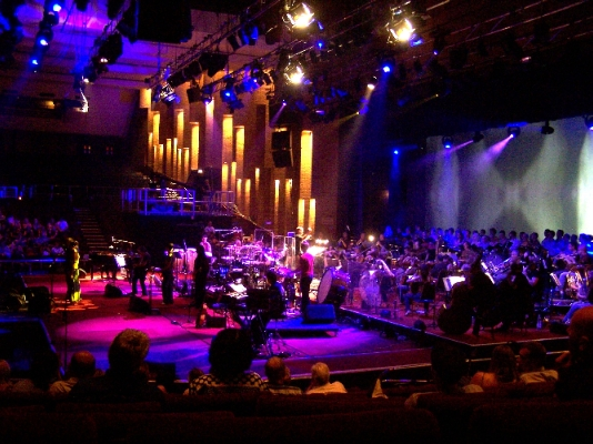 Fotografia de Globus en The Grand Hall, Wembley, Londres el 26 de julio de 2006